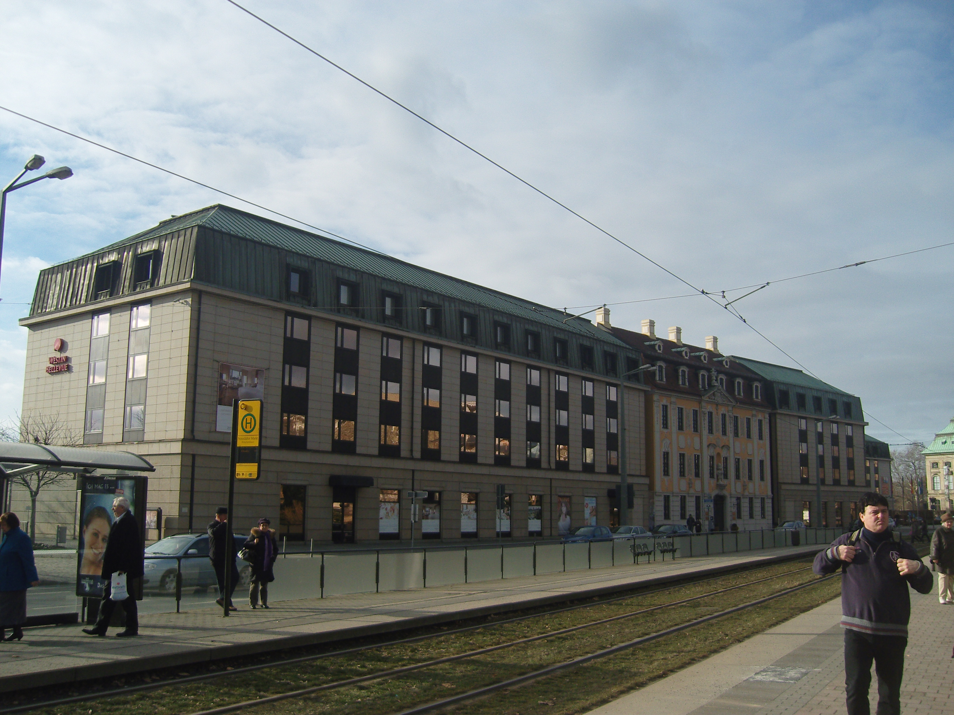 Hotel Bellevue in Dresden Seite zur Großen Meißner Straße